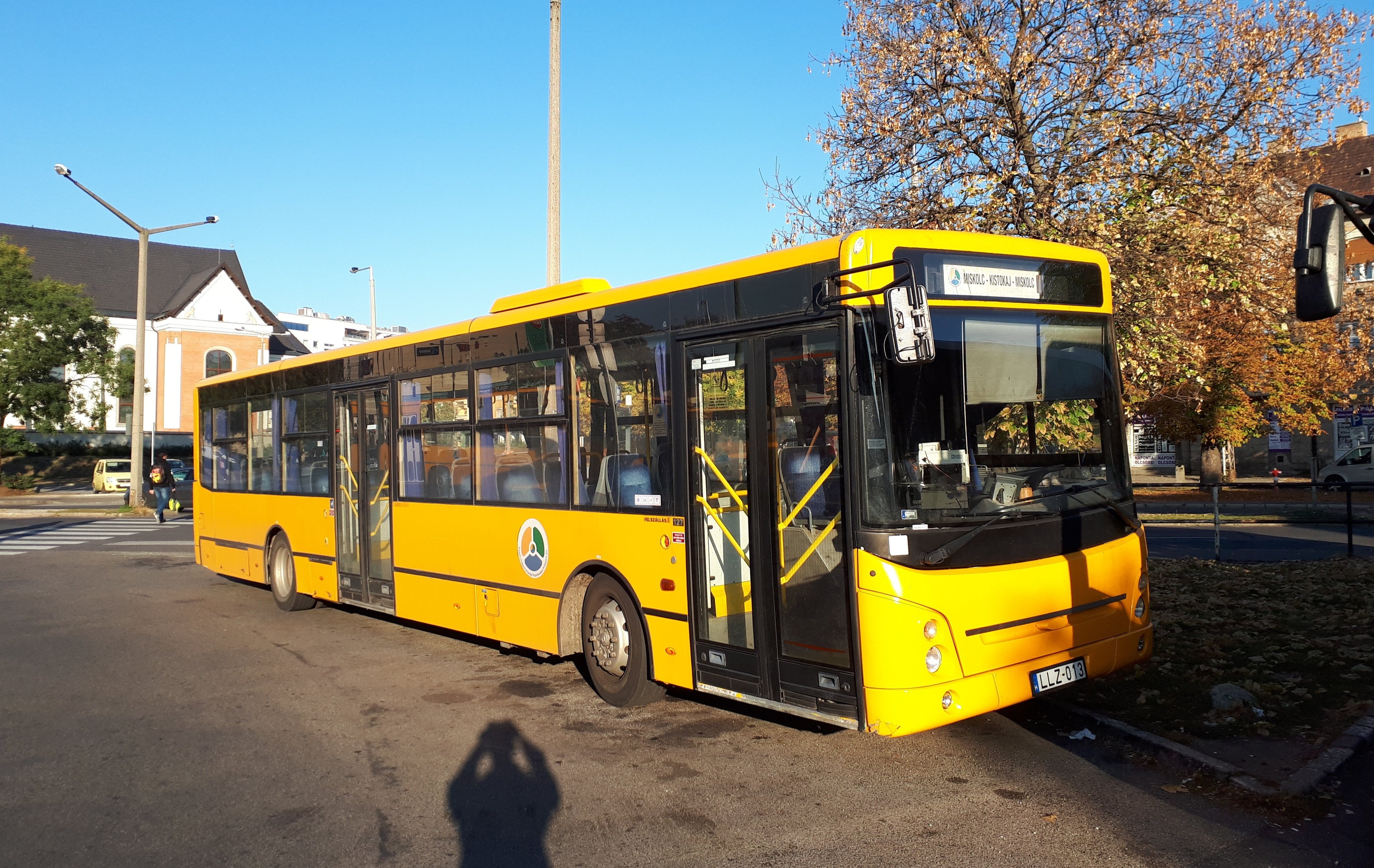 Az ÉMKK LLZ-013 rendszámú Ikarus-ARC E127 típusú busza Miskolcon, a 3738-as helyközi járaton.